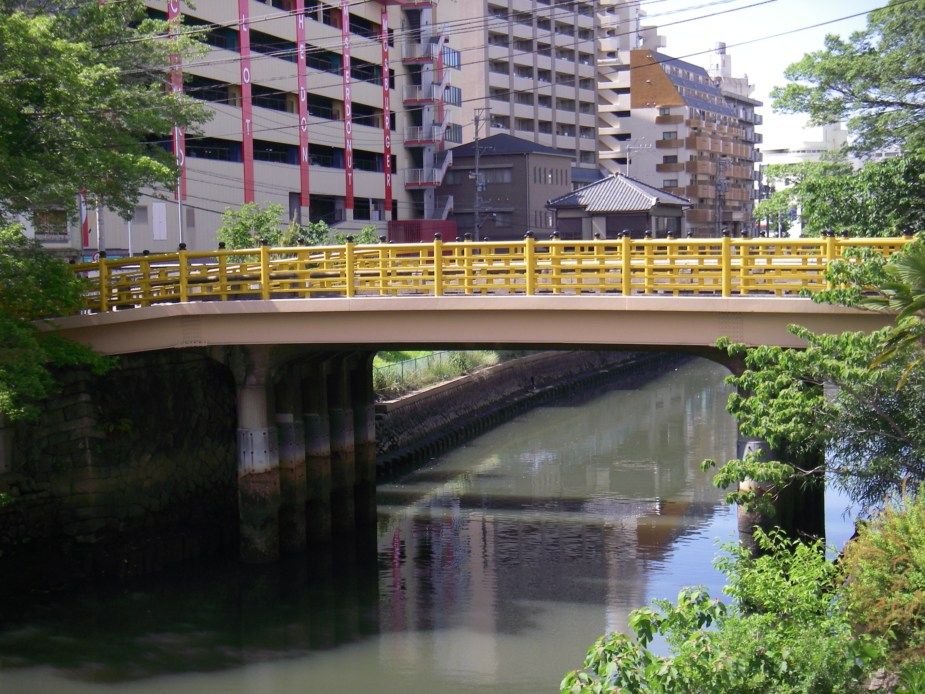 日置橋（愛知県名古屋市） 堀川七橋の一つ。中川区、中区に跨る。